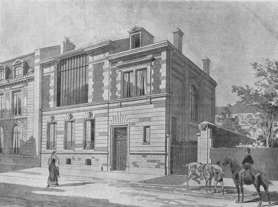 Façade originale de l'Hotel Heilbluth, au 47 rue Ampère, Paris 17ème